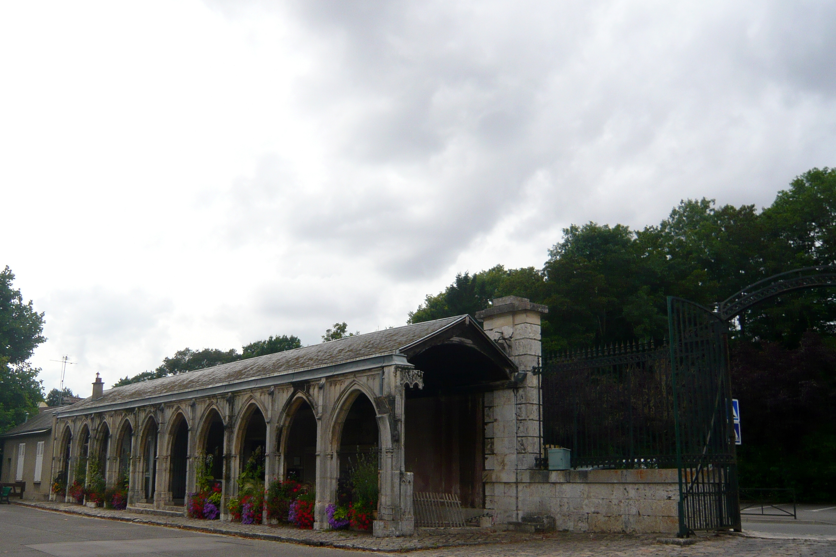 Cloître reconstruit de l'abbaye de Coulombs, fondation d'Aligre et Marie-Thérèse, Lèves, Eure-et-Loir (France).